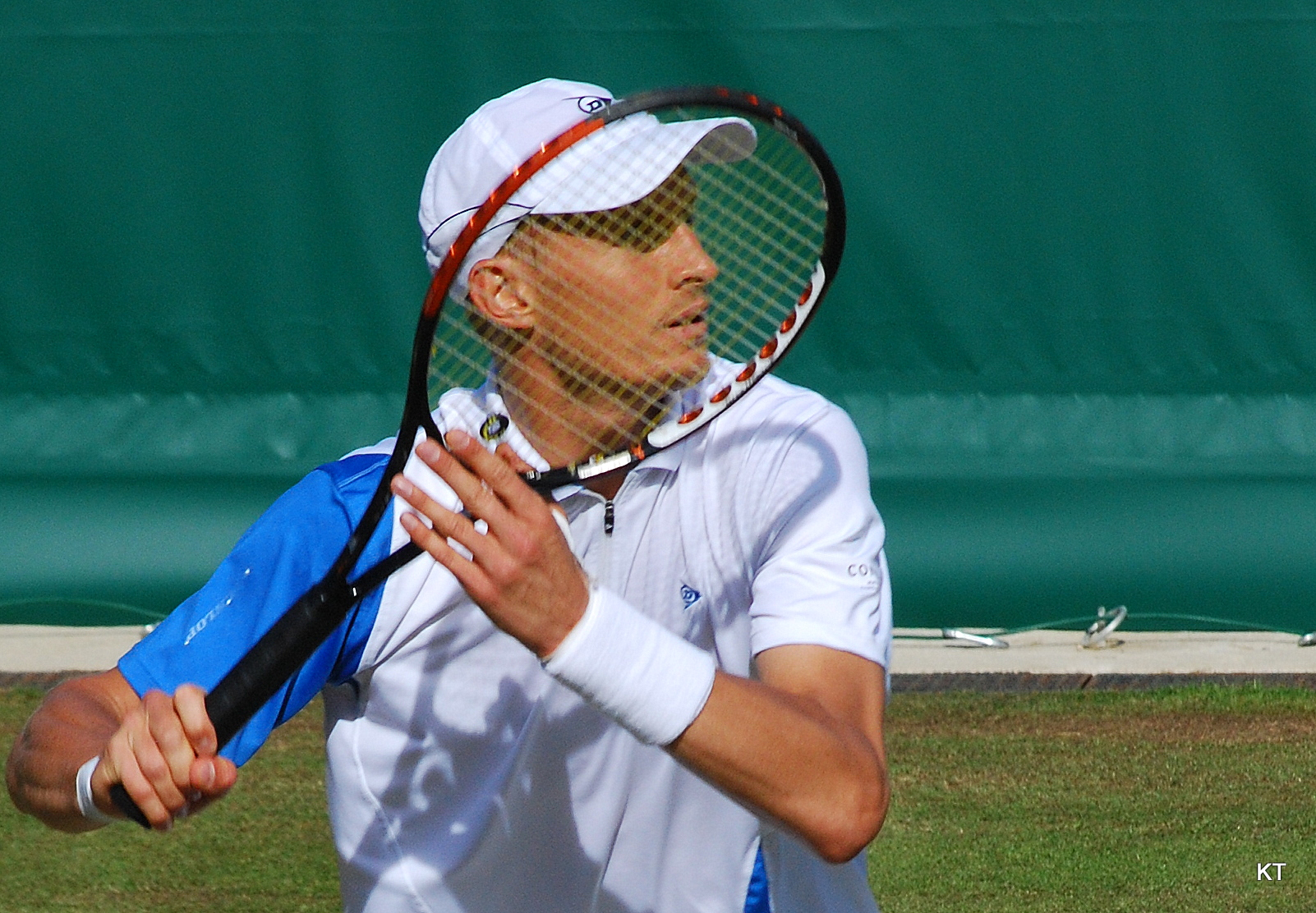 Stoke Park, June 2010.